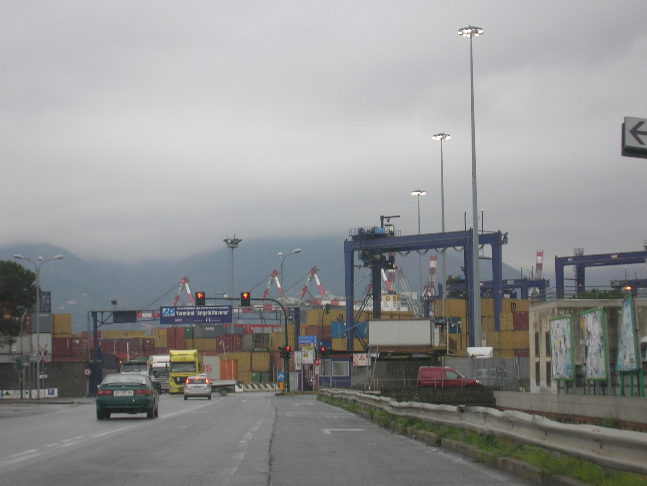 La Spezia - Porto il Terminal "Ravano"